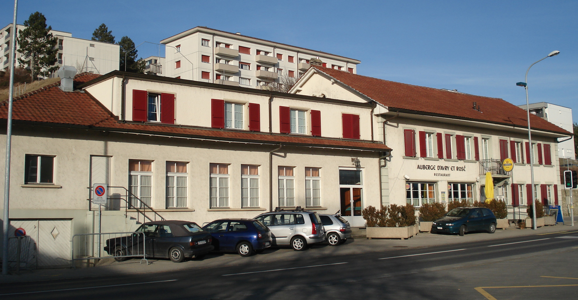 Auberge de la gare de Rosé, commune Avry